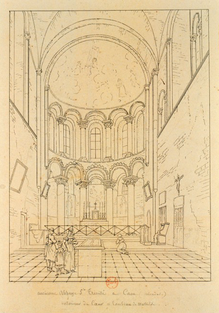 français: Ancienne Abbaye Ste Trinité à Caen (Calvados). Intérieur du coeur [sic] et Tombeau de Mathilde; Dessin à la plume et encre de Chine; 19,7 x 14,1 cm; subject: Tombeaux de Mathilde de Flandre (reine d'Angleterre; (c. 1031-1083) au Église de la Trinité (Abbaye-aux-Dames), Caen (Calvados). english: Ancienne Abbaye Ste Trinité à Caen (Calvados). Intérieur du coeur [sic] et Tombeau de Mathilde; Drawing; 19,7 x 14,1 cm; subject: Tomb of Matilda of Flanders (queen consort of England; (c. 1031-1083) in the Église de la Trinité (Abbaye-aux-Dames), Caen (Calvados). deutsch: Ancienne Abbaye Ste Trinité à Caen (Calvados). Intérieur du coeur [sic] et Tombeau de Mathilde; Zeichnung; 19,7 x 14,1 cm; subject: Grab von Mathilde von Flandern (Königin von England; (c. 1031-1083) in der Église de la Trinité (Abbaye-aux-Dames), Caen (Calvados).